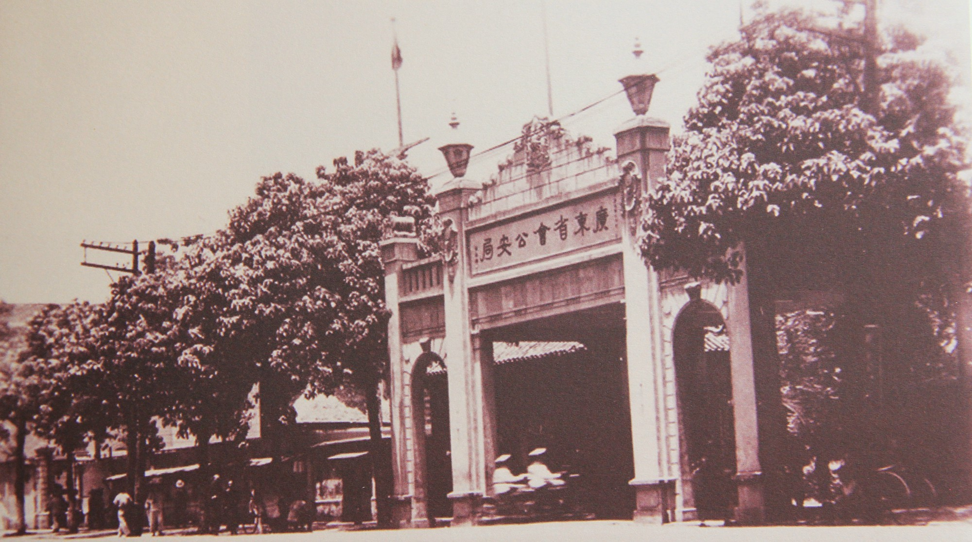 中華民國廣東省會（廣州）公安局。